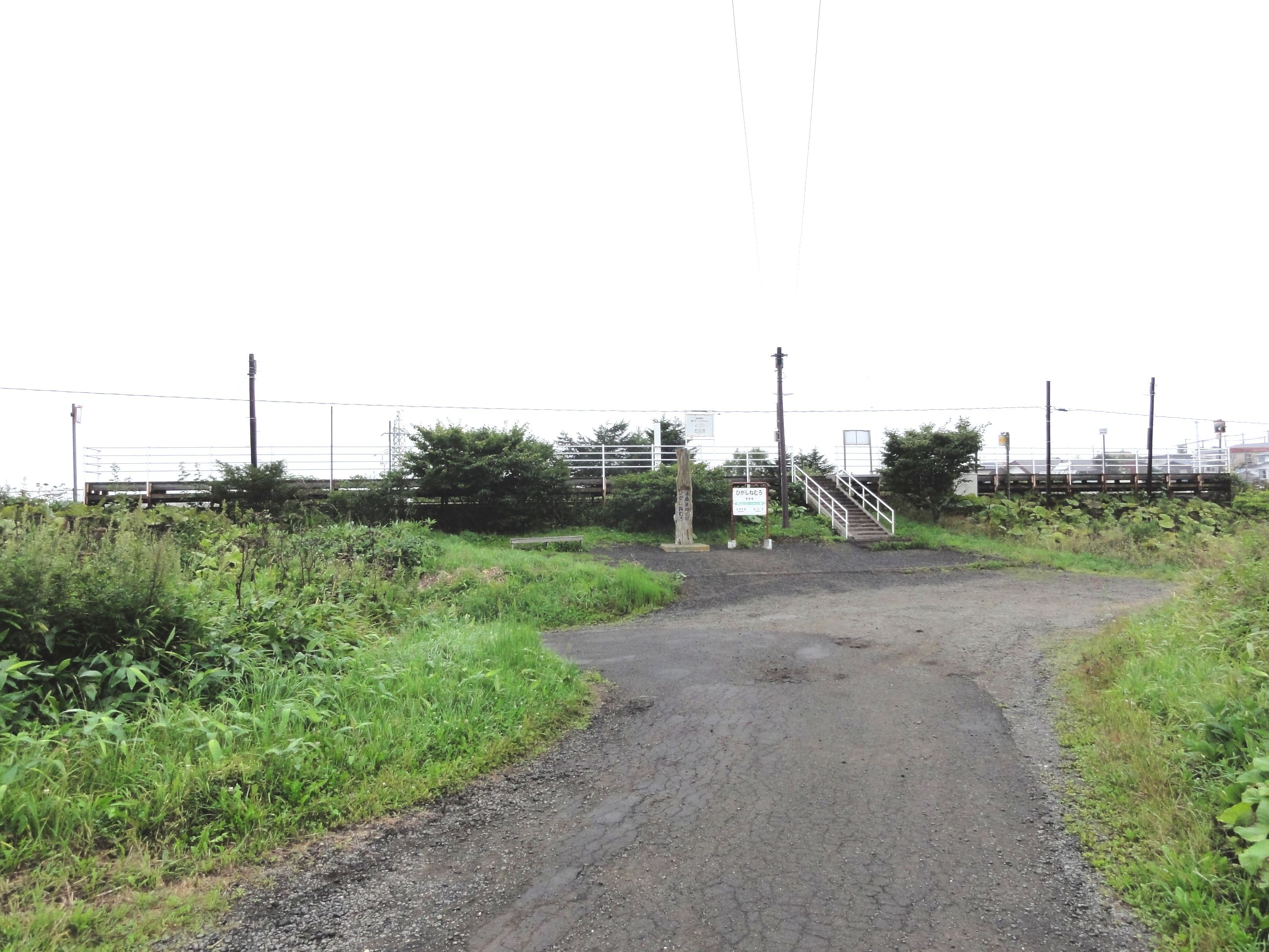 東根室駅